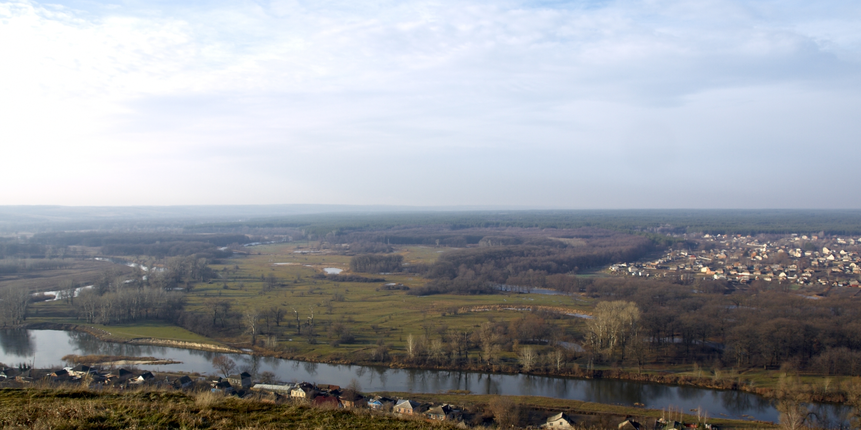 Северский Донец возле Изюма